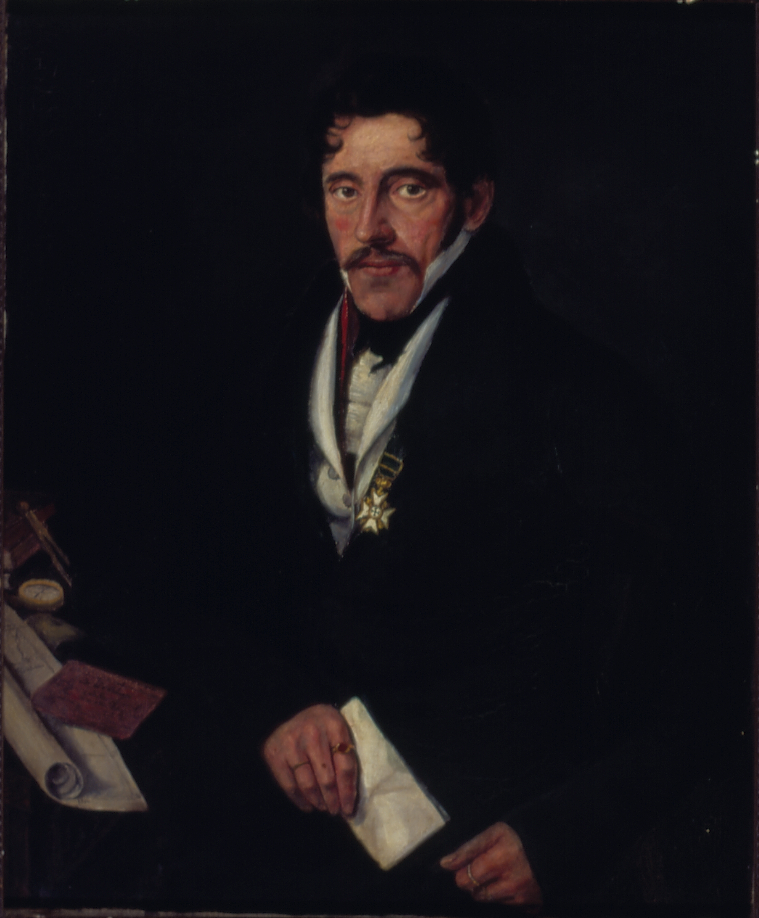 Obra que integra o acervo do Museu Paulista da USP.